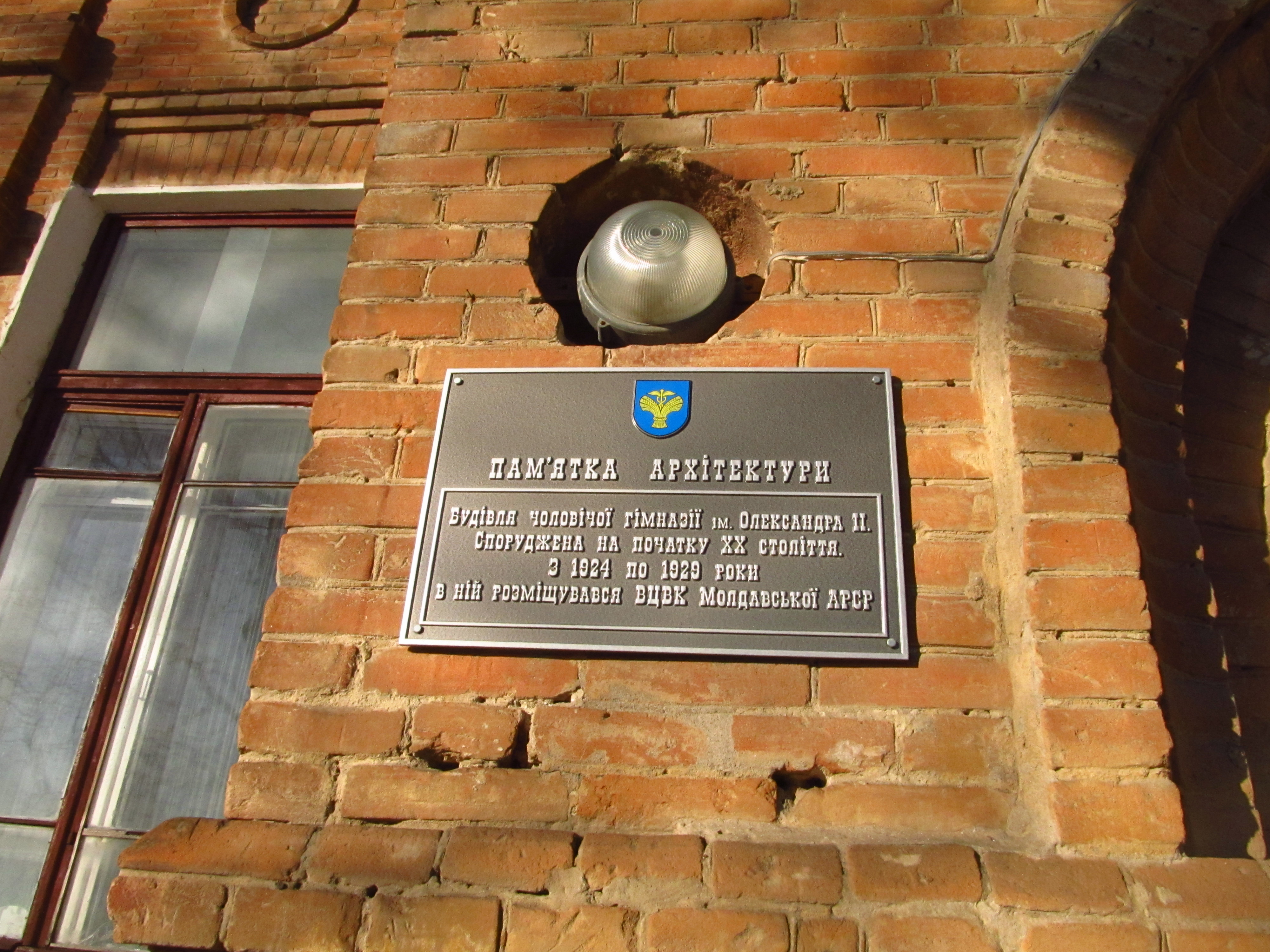 Гімназія, Балта, вул. Шевченка, 16